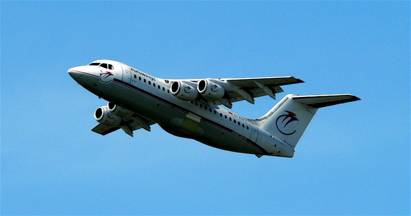 Eurowings Airplane after launch at Friedrichshafen Flughafen (Germany)